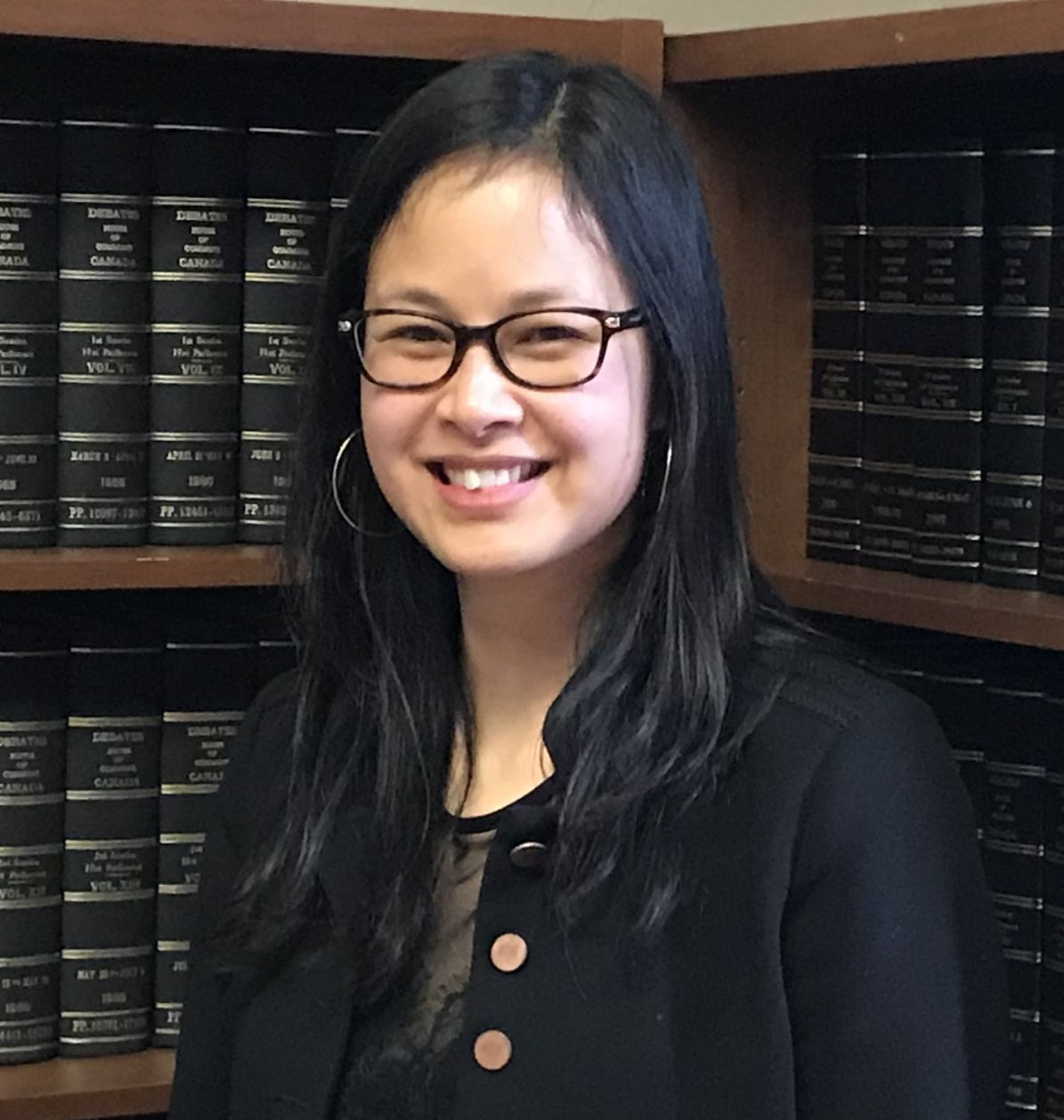 Anne Minh-Thu Quach, députée NPD de Salaberry—Suroît.